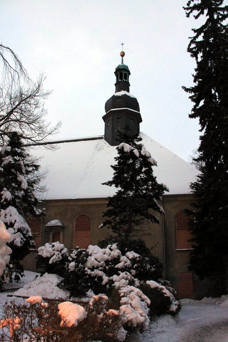 Die ehemalige Hospitalkirche in Annaberg-Buchholz